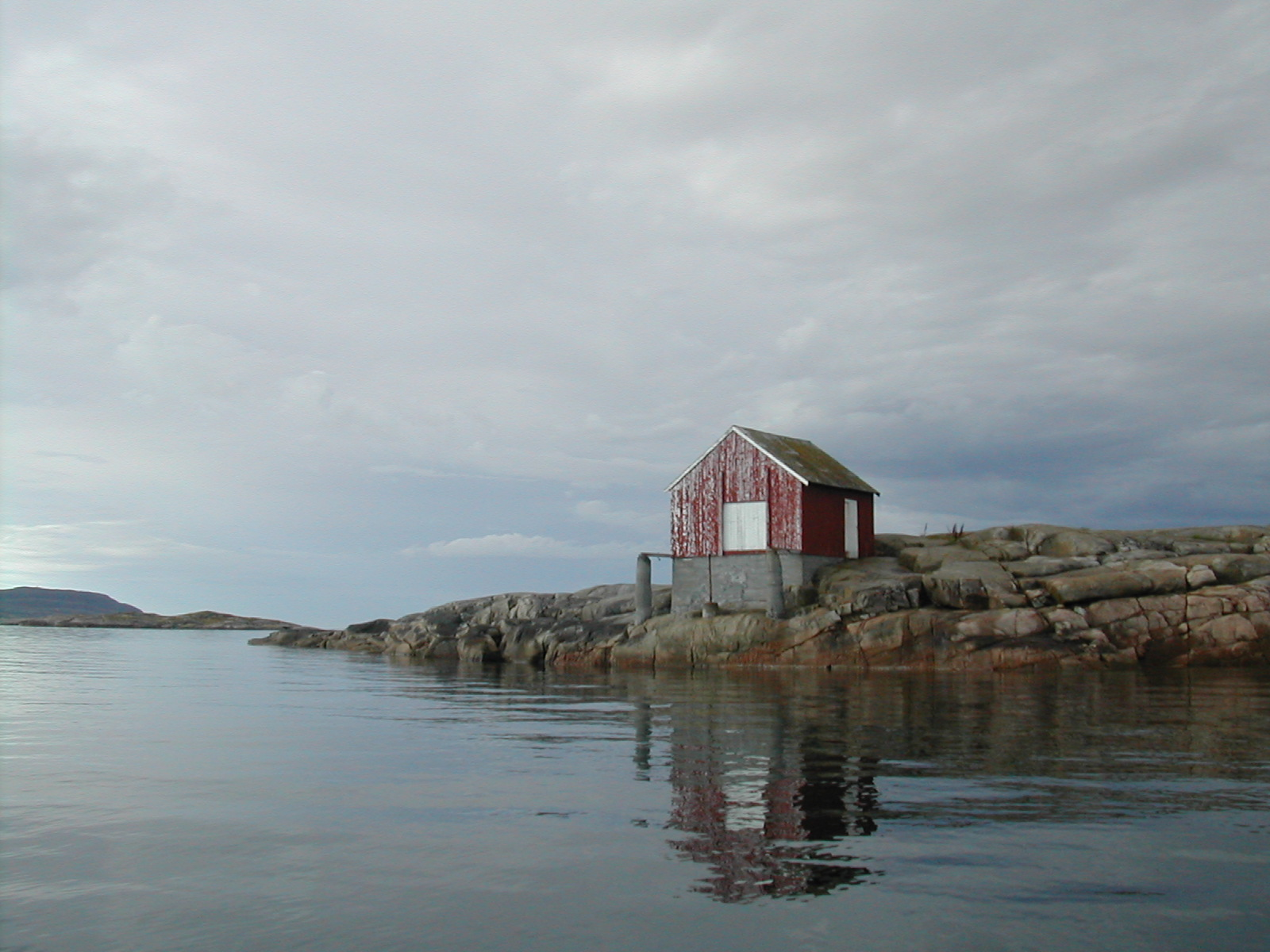 Naust i Åfjord